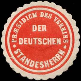 Sealing stamp Title: Praesidium des Vereins der Deutschen Standesherrn Description: Standesherren, rot, weiß, geprägt Place: size: 3 cm